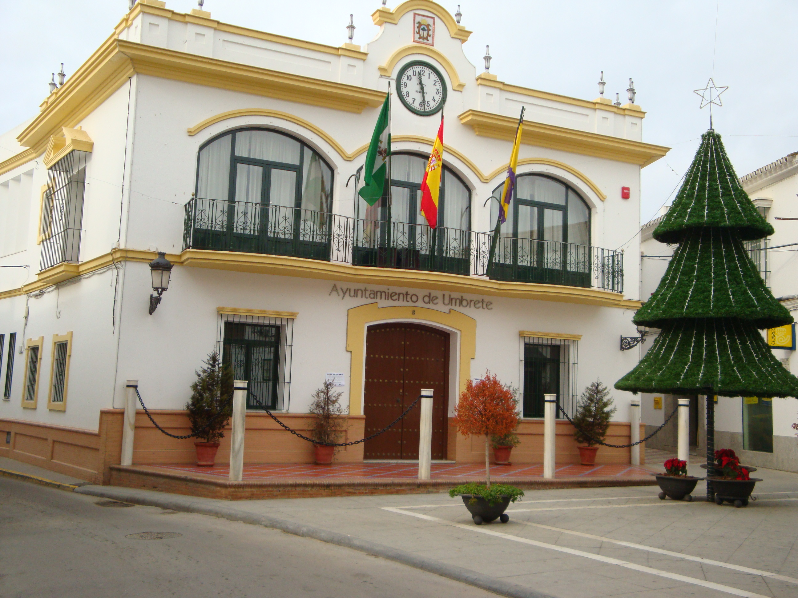 Casa Consistorial de Umbrete